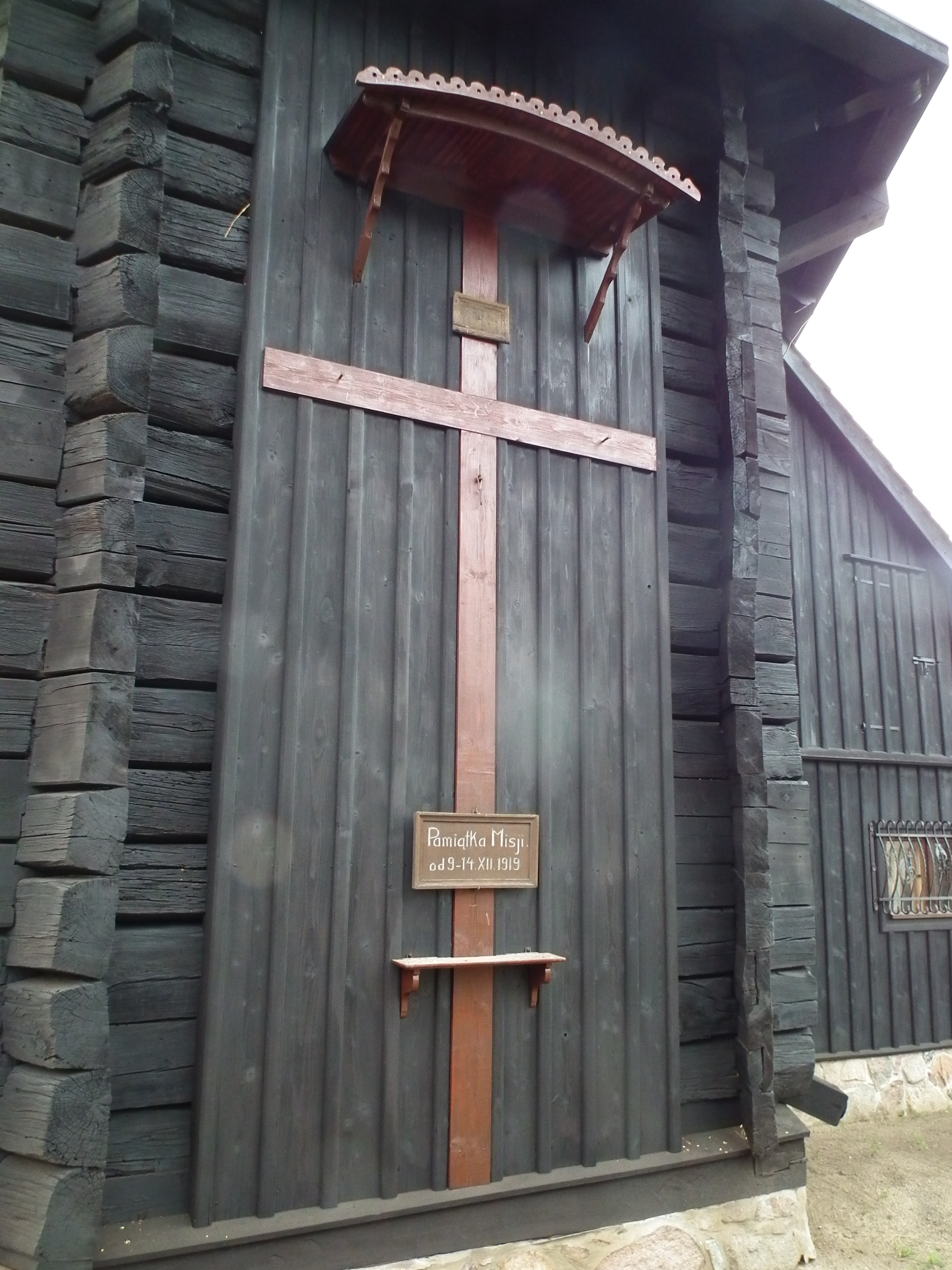 Kościół św. Franciszka z Asyżu w Bronikowie, gm. Śmigiel.